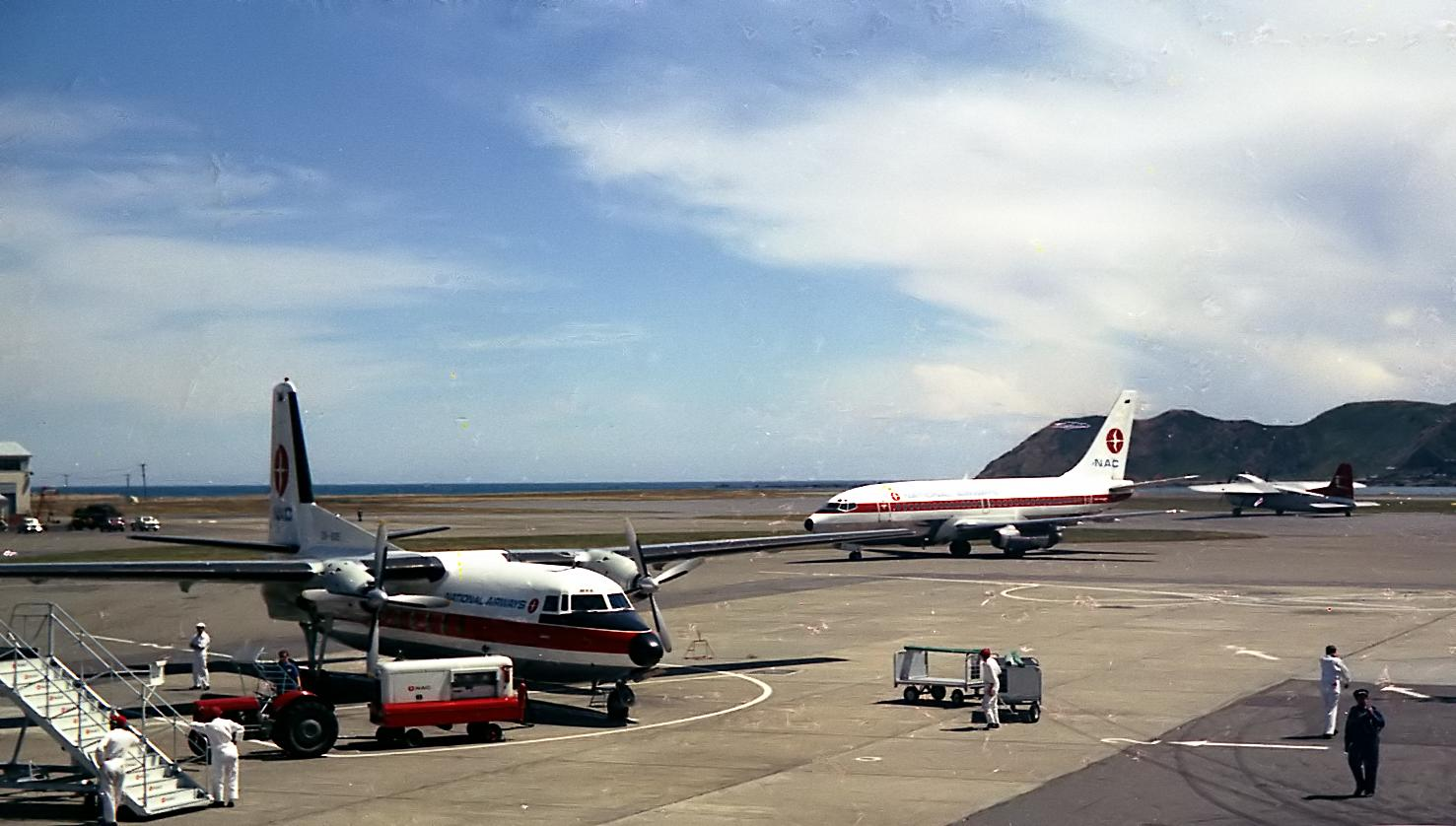 NAC Fokker F27 and Boeing 737 at Wellington Airport in 1969